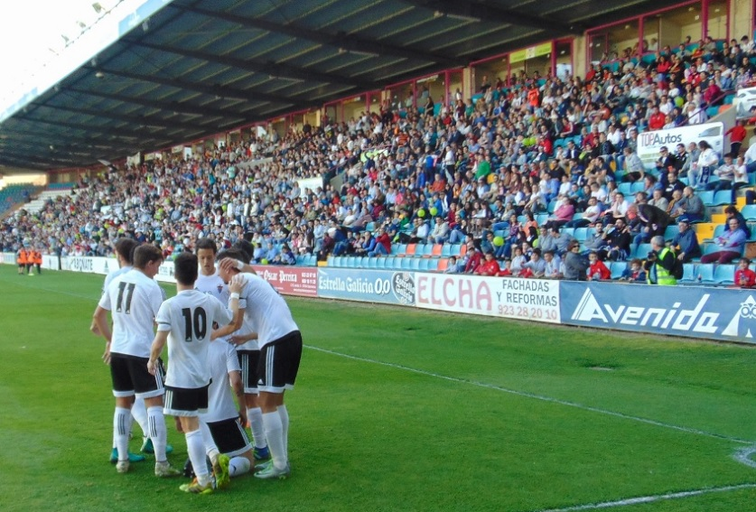 CF Salmantino y 3000 espectadores/as